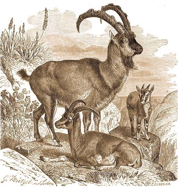 Alfred Edmund Brehm Az állatok világa művében a Bezoár kecske (Capra aegagrus Gm.) forrás: Brehm - Állatok világa